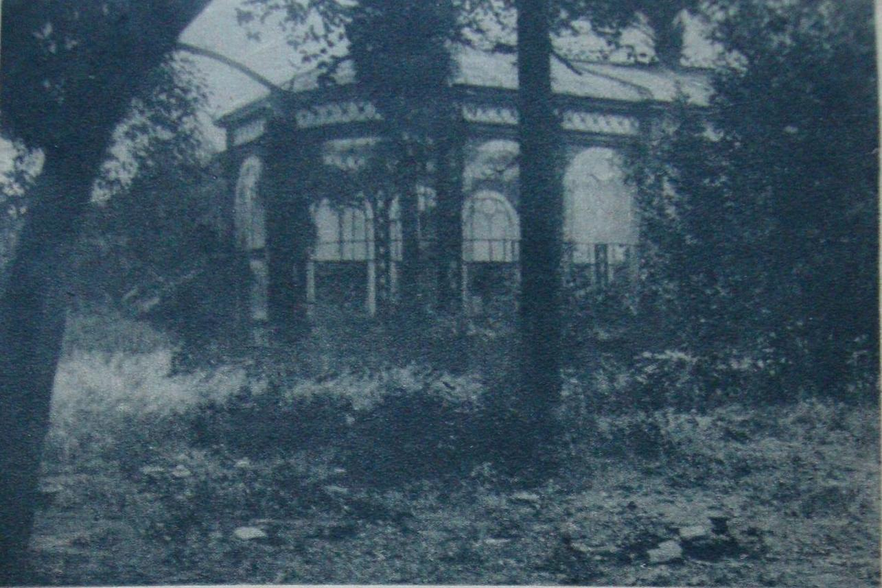 Ruinas del invernadero de la antigua Quinta de Lezica, construida en la década de 1860 por don Ambrosio Plácido de Lezica, abandonada hacia 1880 y demolida en 1927 para construir el actual Parque Rivadavia, del barrio de Caballito. Buenos Aires, Argentina.